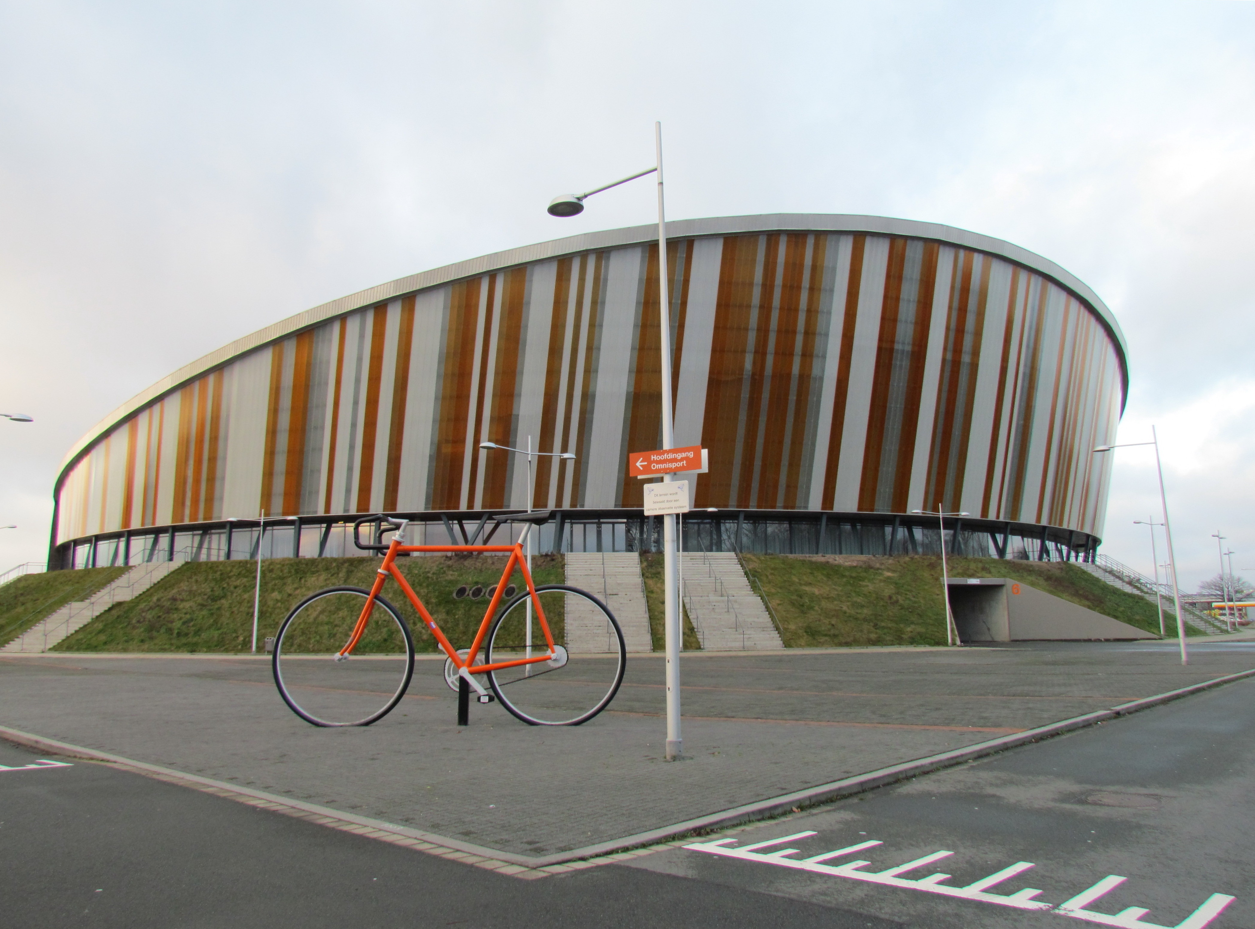 Omnisport Apeldoorn met 3,5 hoog beeld van een baanfiets. Dit beeld werd in de nacht van 18 op 19 december 2012 ontvreemd. Het bleek een stunt van oudejaarsvereniging 'de Oliebol' uit Vledder (Drenthe). Op 4 januari 2013 werd het beeld ongeschonden teruggebracht.